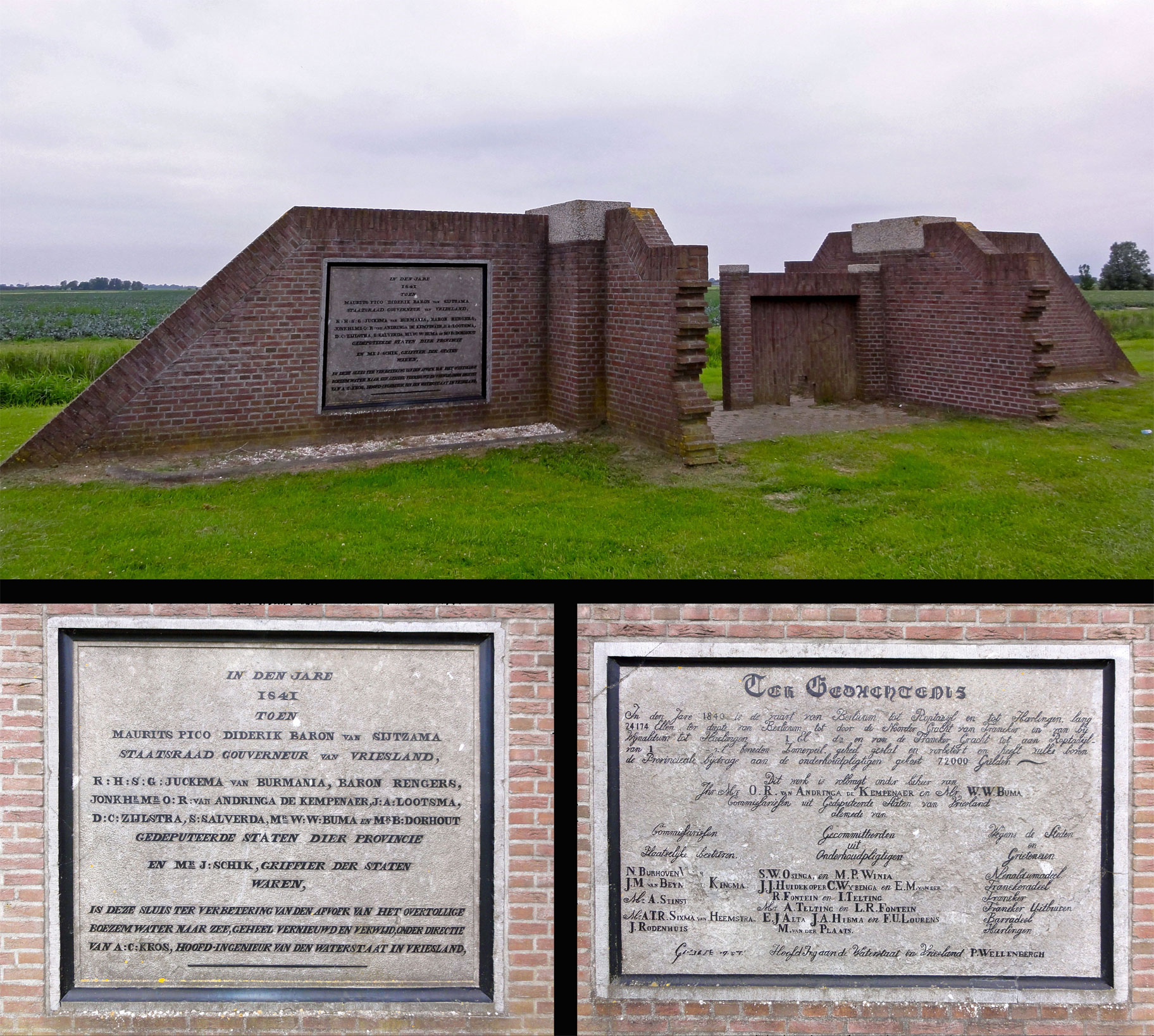 Monument voor de in 1982 afgebroken sluis in de Slachte